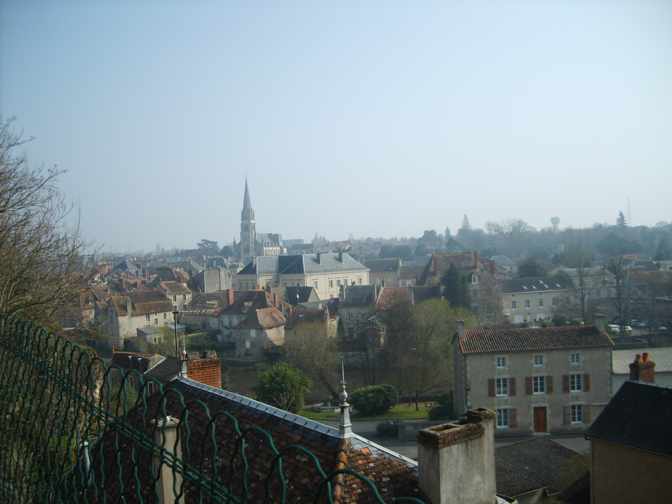 Panorama miasta Montmorillon.